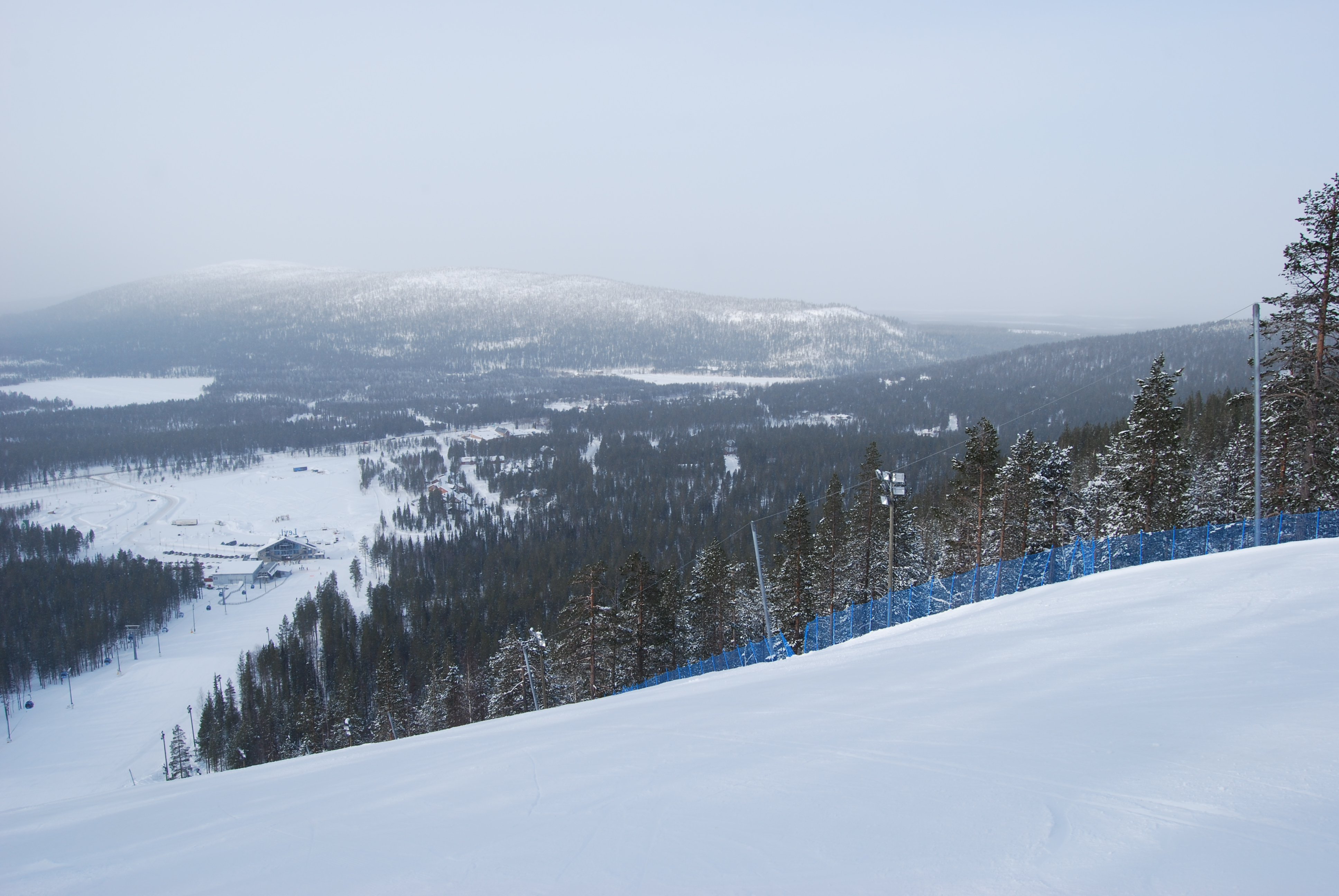 Kuva Levin Black Run -rinteen alusta.